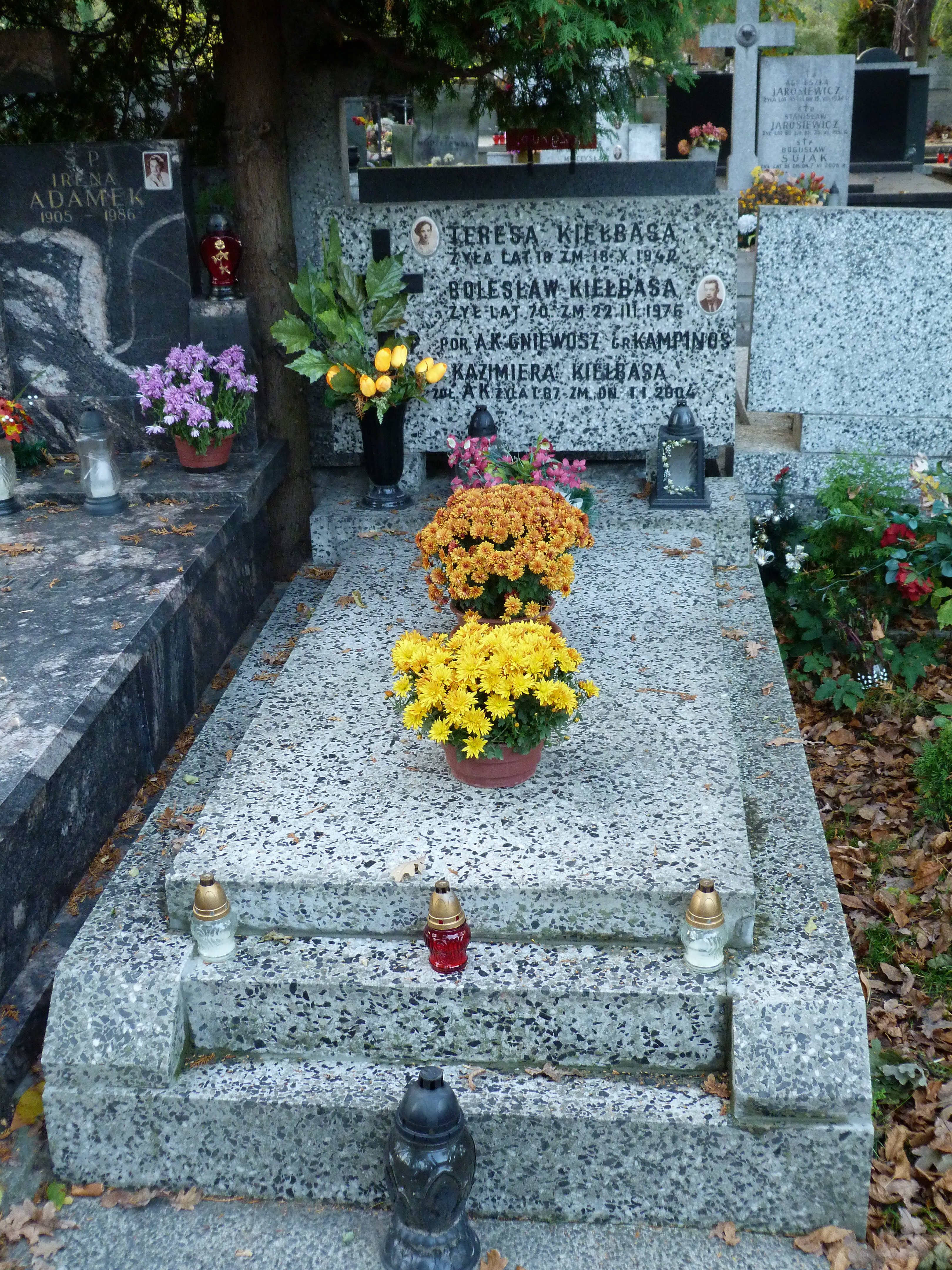 Grób małżonków Kazimiery i Bolesława Kiełbasa